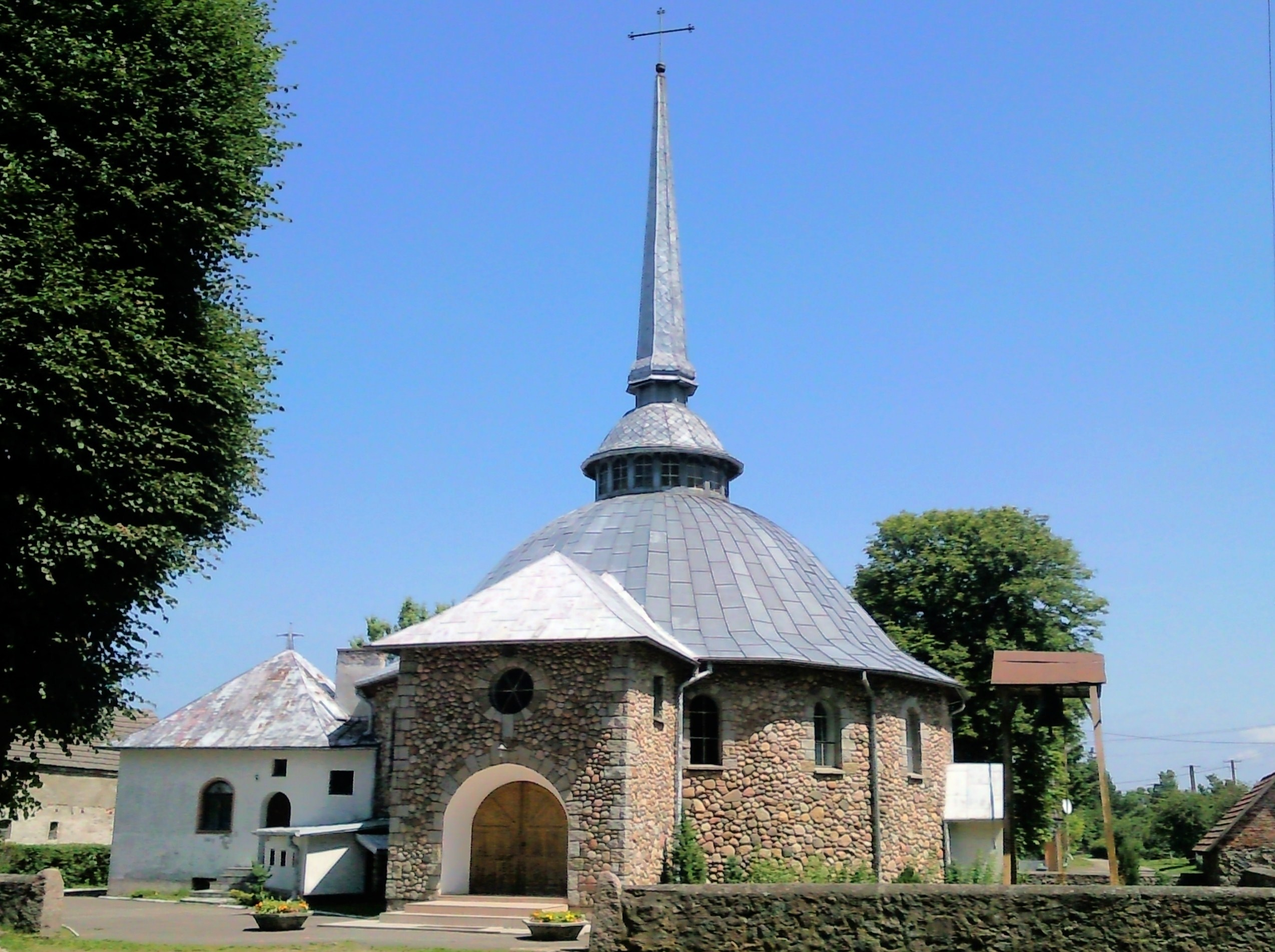 Kościół w Broczynie p.w. Matki Boskiej Częstochowskiej z 1793 r.